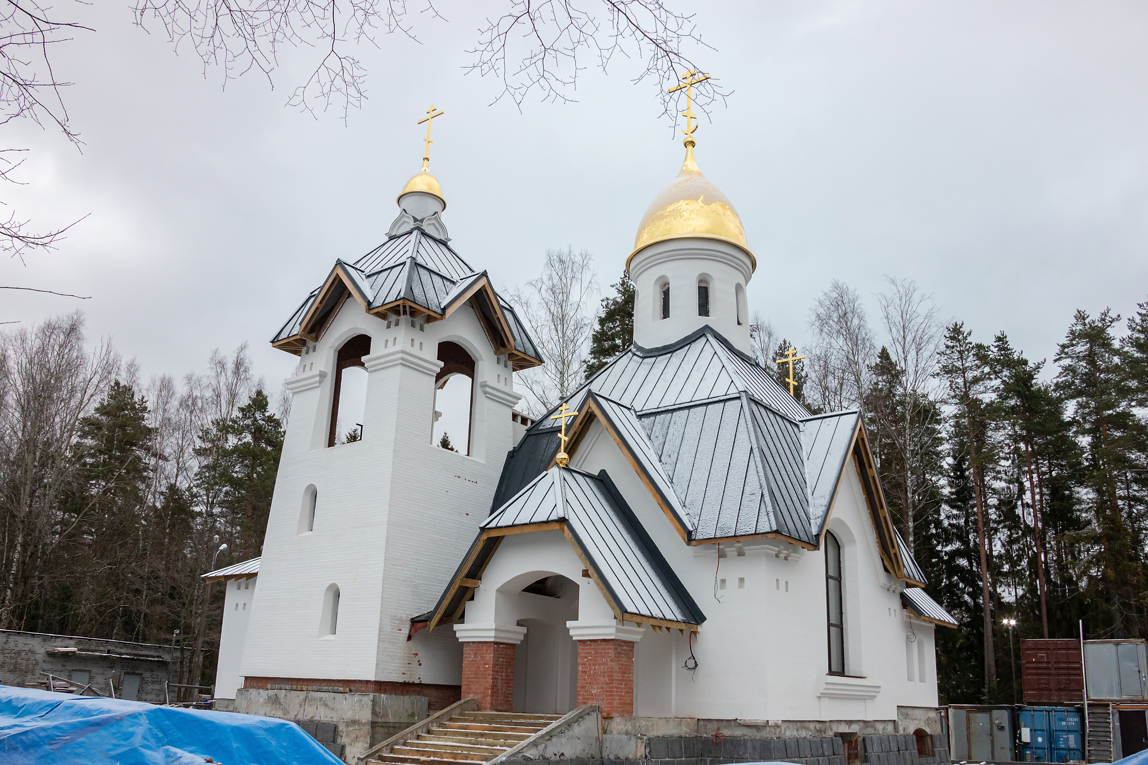 Декабрь 2019г., вид с южного фасада